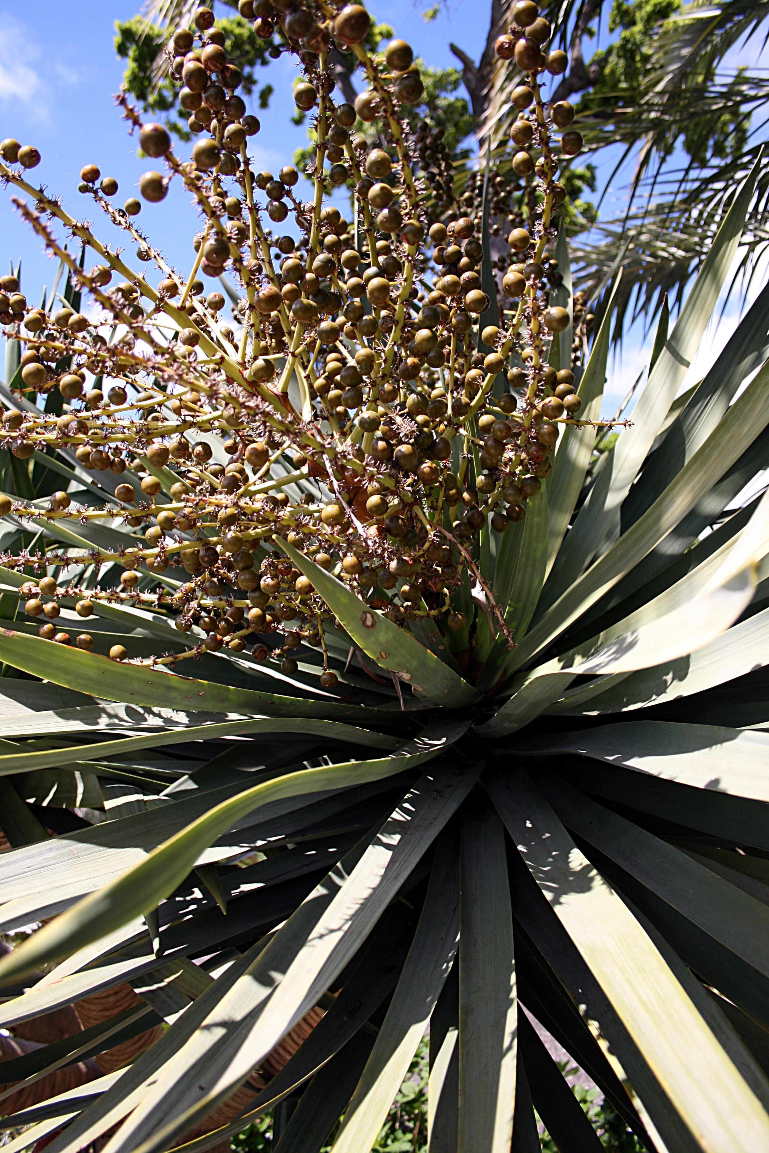 Monte_(Funchal)_-_Dracaena_draco_(Fruits)_(Kanarischer_Drachenbaum)